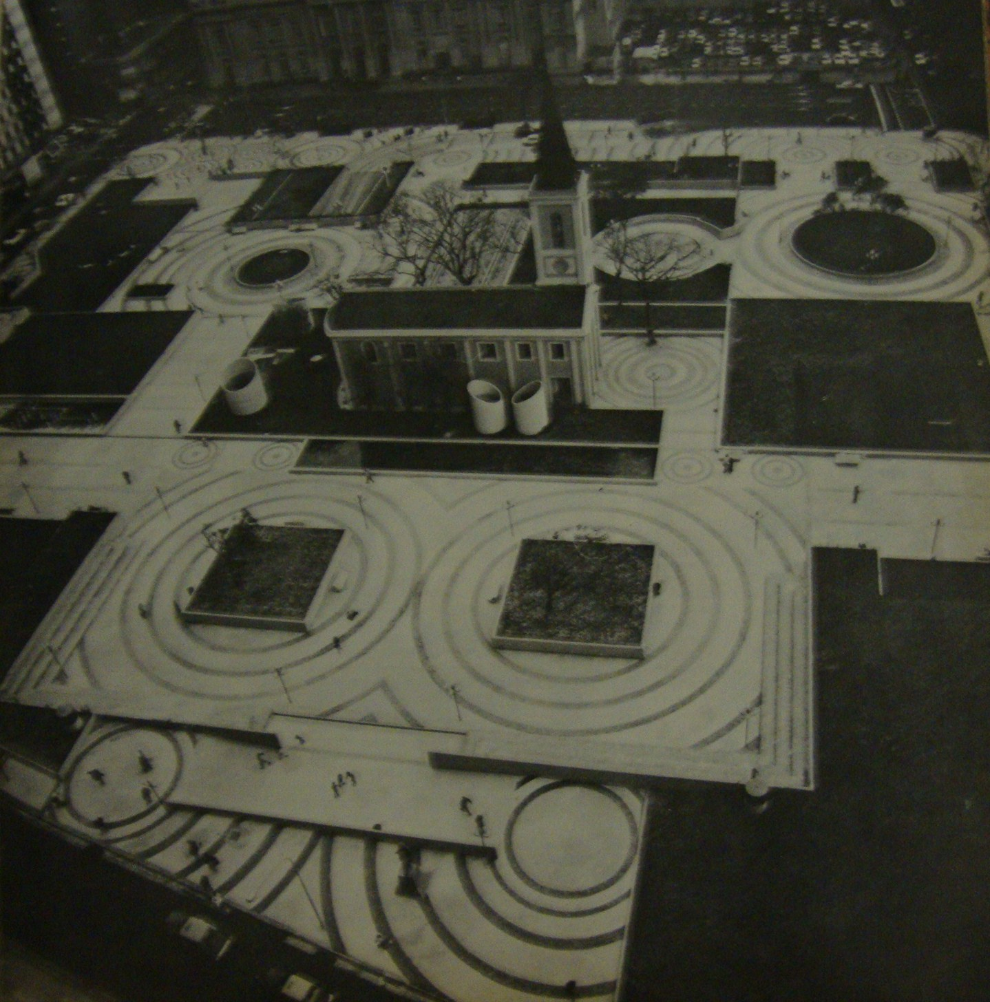 Vista de la Plaza Dr. Bernardo Houssay desde la Facultad de Medicina de la Universidad de Buenos Aires.